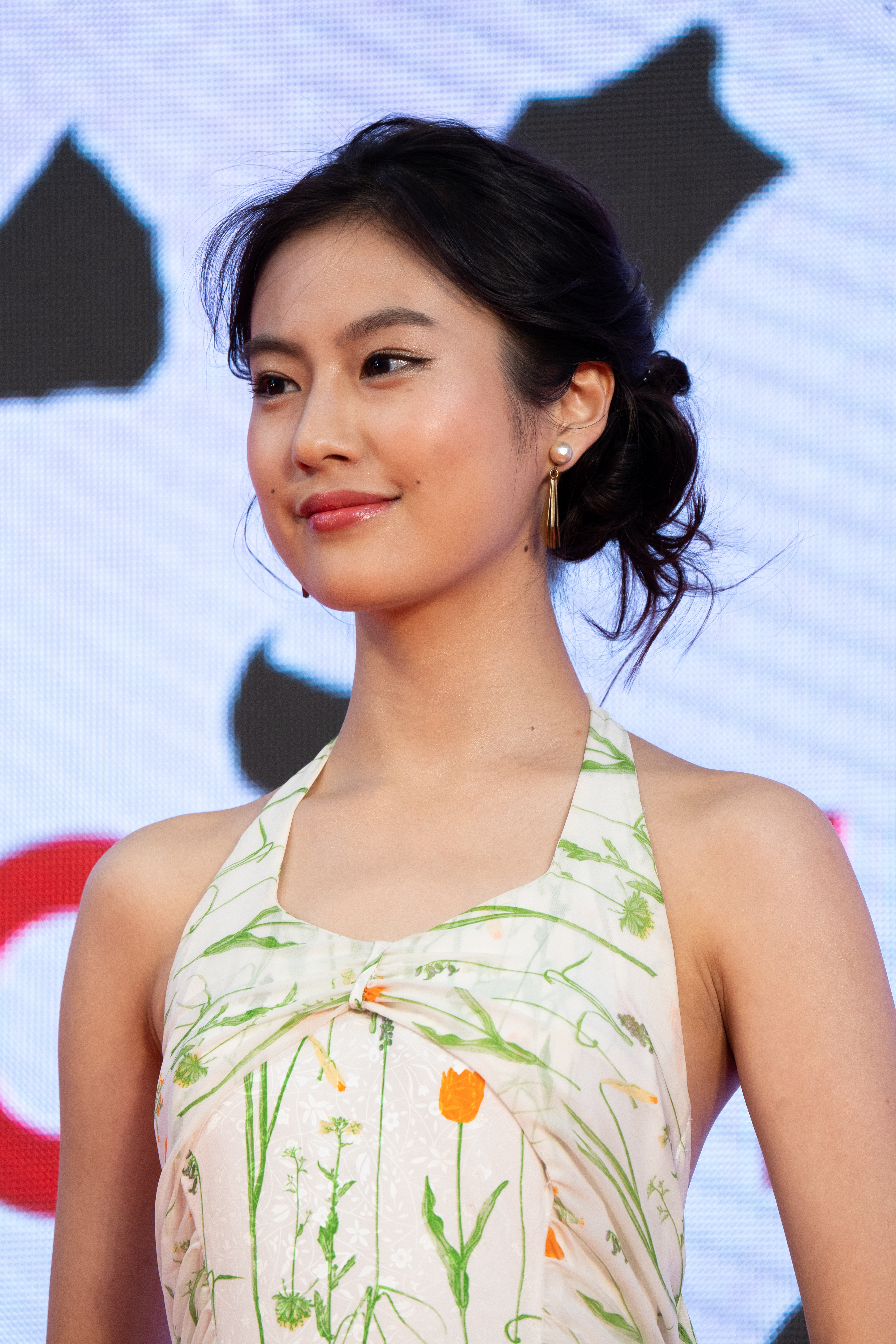 第32回 東京国際映画祭 オープニングセレモニー 恒松祐里 (殺さない彼と死なない彼女)